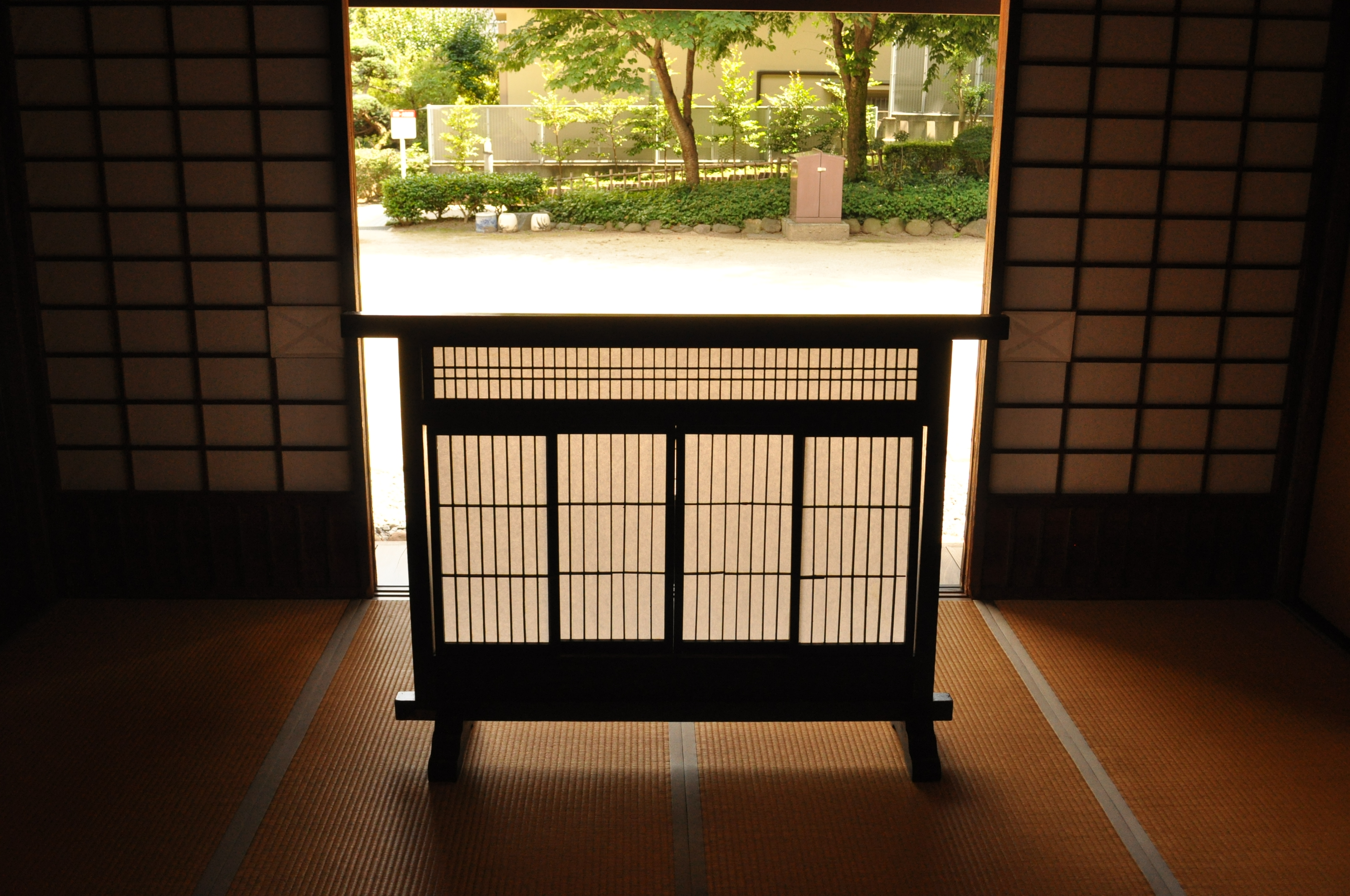 土間からでなく賓客はここから招き入れた